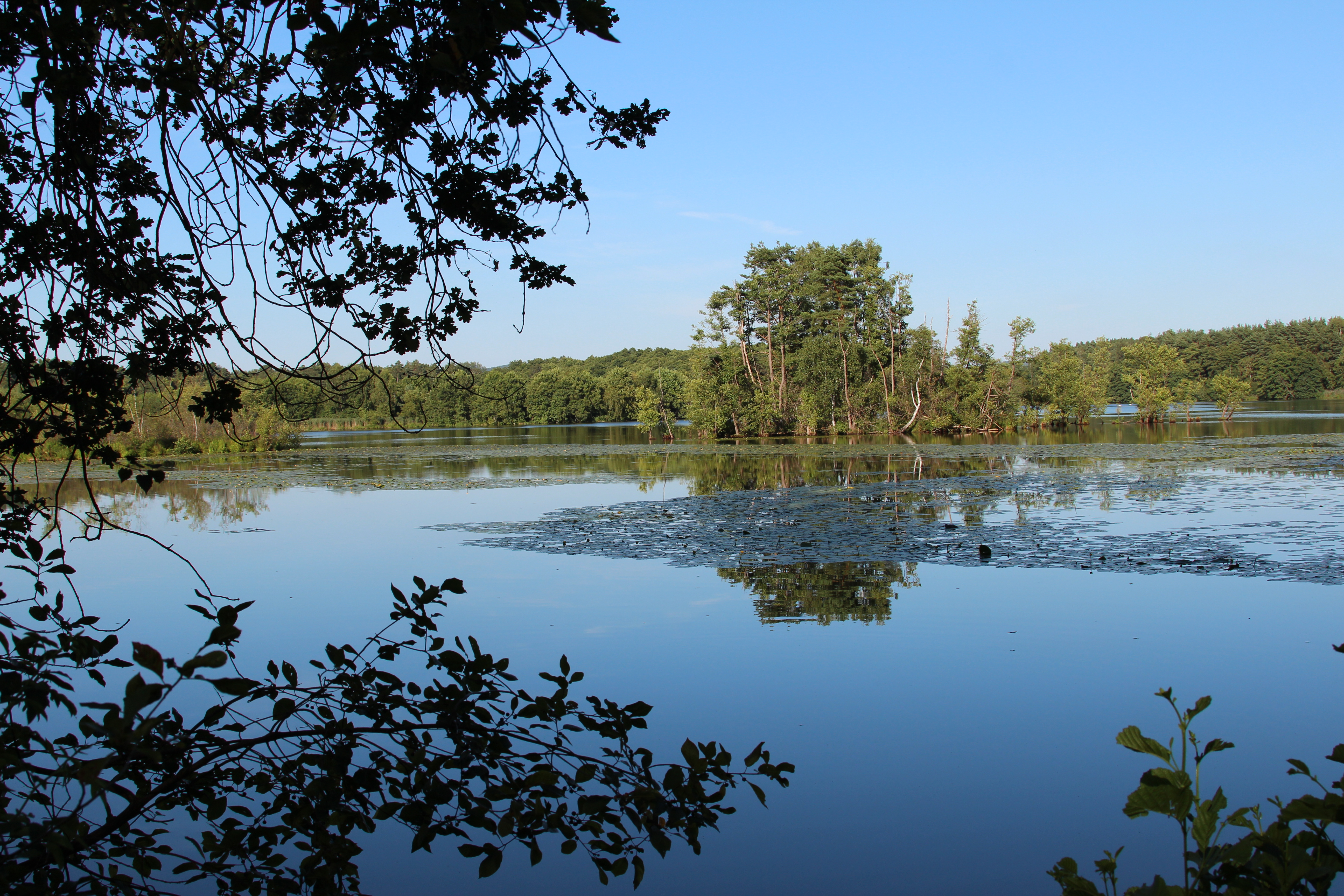 Charlottenhofer Weihergebiet, Forstweiher: Landkreis Schwandorf, Oberpfalz, Bayern